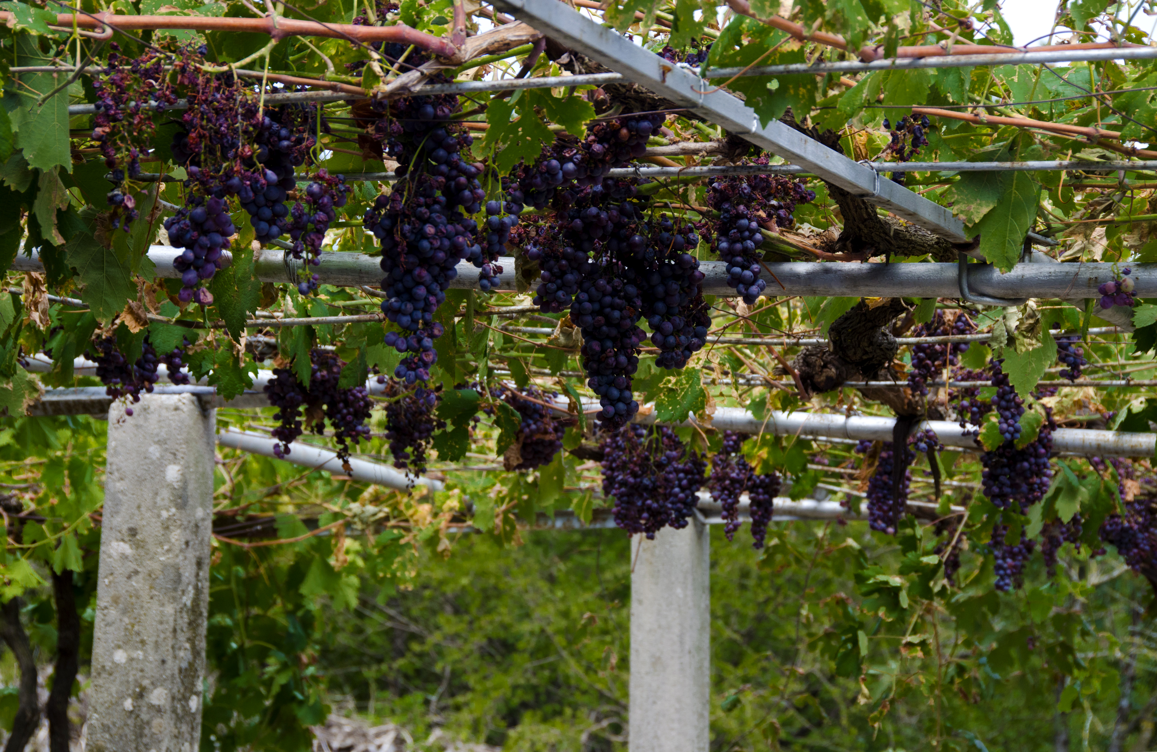 Grožđe, Manastir Tvrdoš This image was uploaded as part of Trace of Soul 2018.